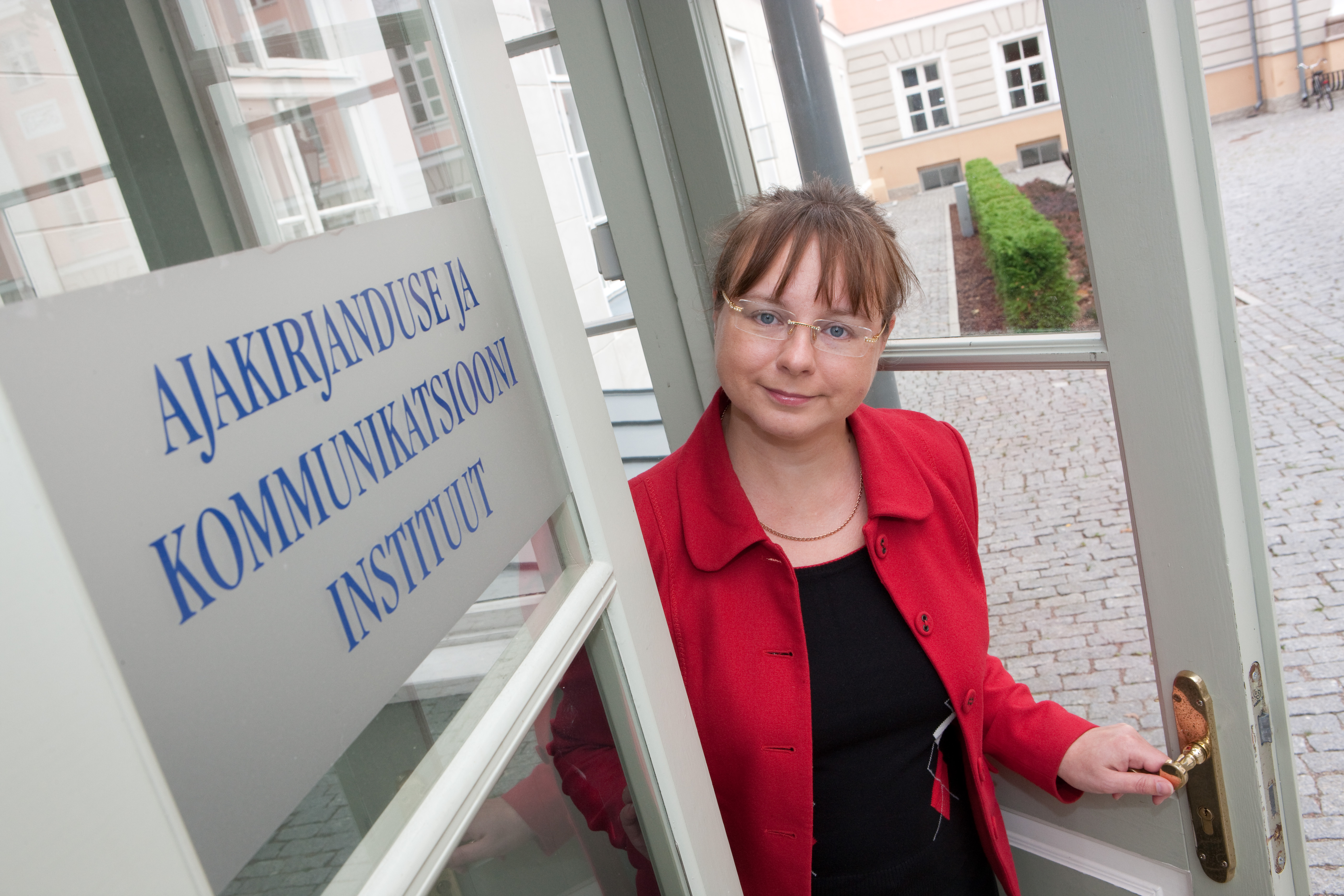 Tartu Ülikooli sotsiaalteaduskonna ajakirjanduse ja kommunikatsiooni instituudi meediauuringute õppetooli dotsent Veronika Kalmus. Foto raamatusse "Teaduse tegijad".